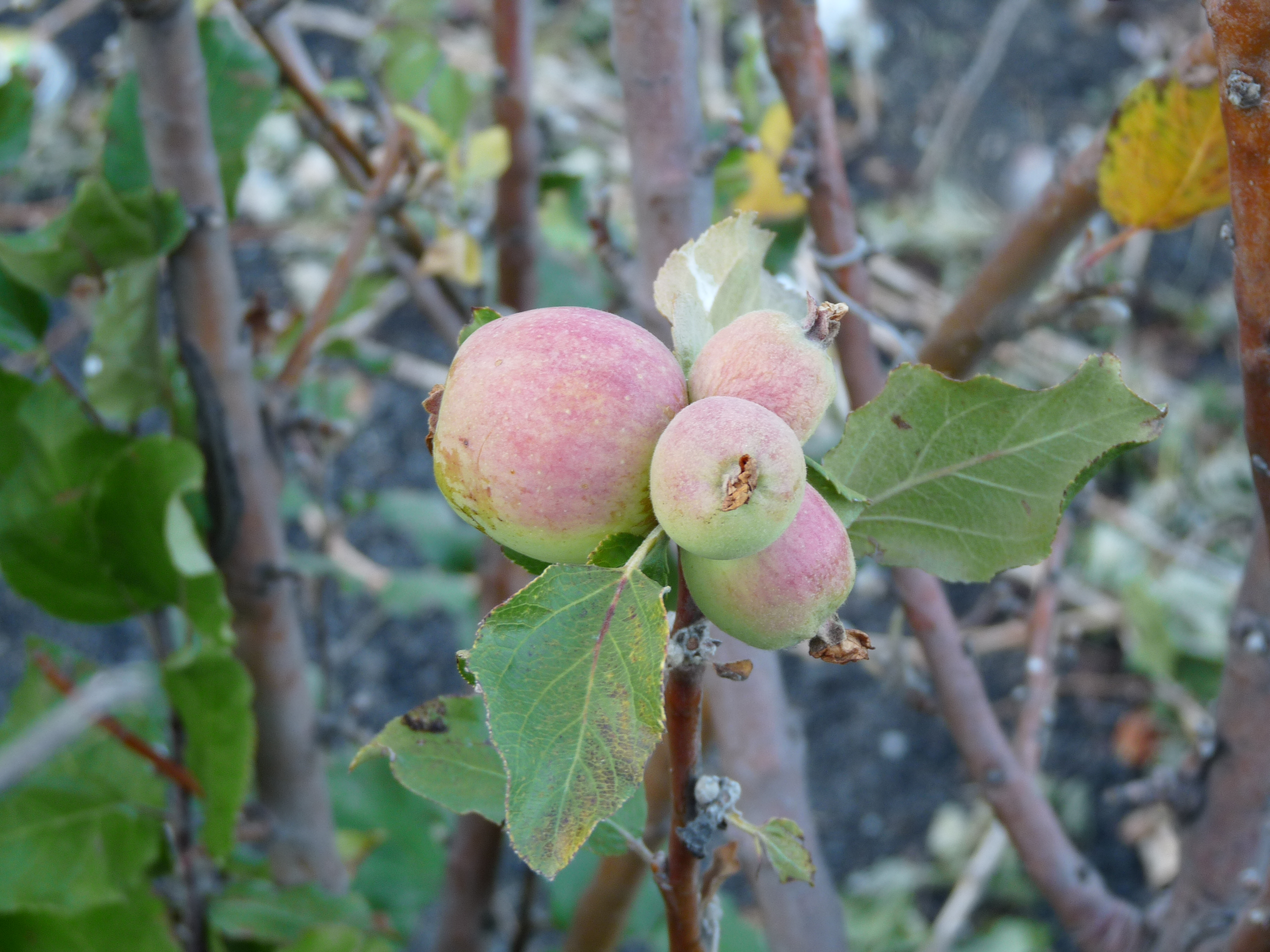 Pommier à Chã das Caldeiras (île de Fogo, Cap-Vert)